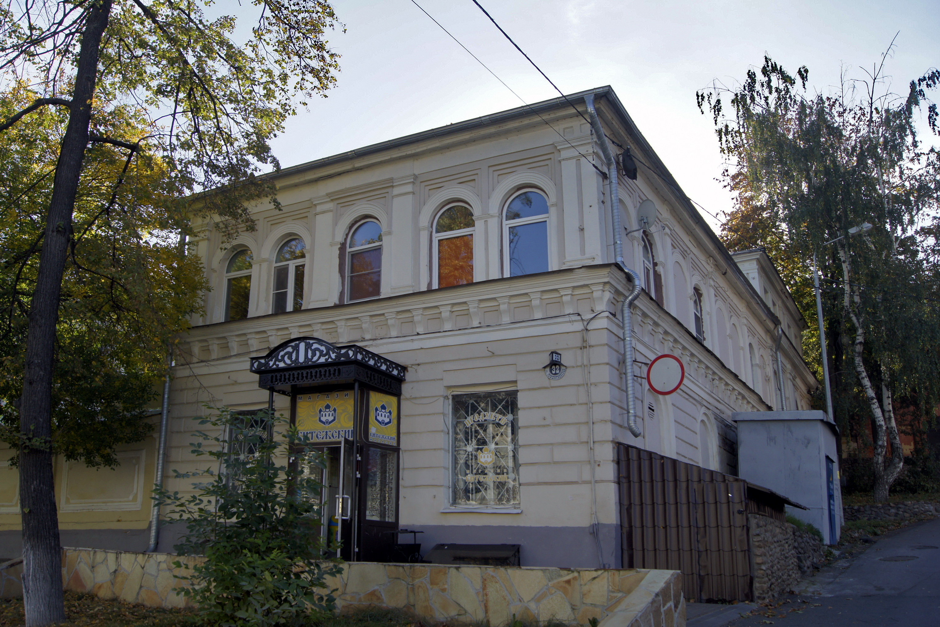 Жилой дом: улица Рождественская, 32, Нижний Новгород, Нижегородская область